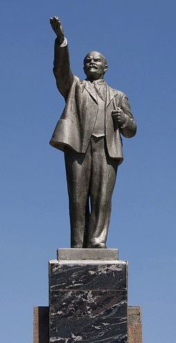 Памятник Ленину в Центральном парке Тольятти